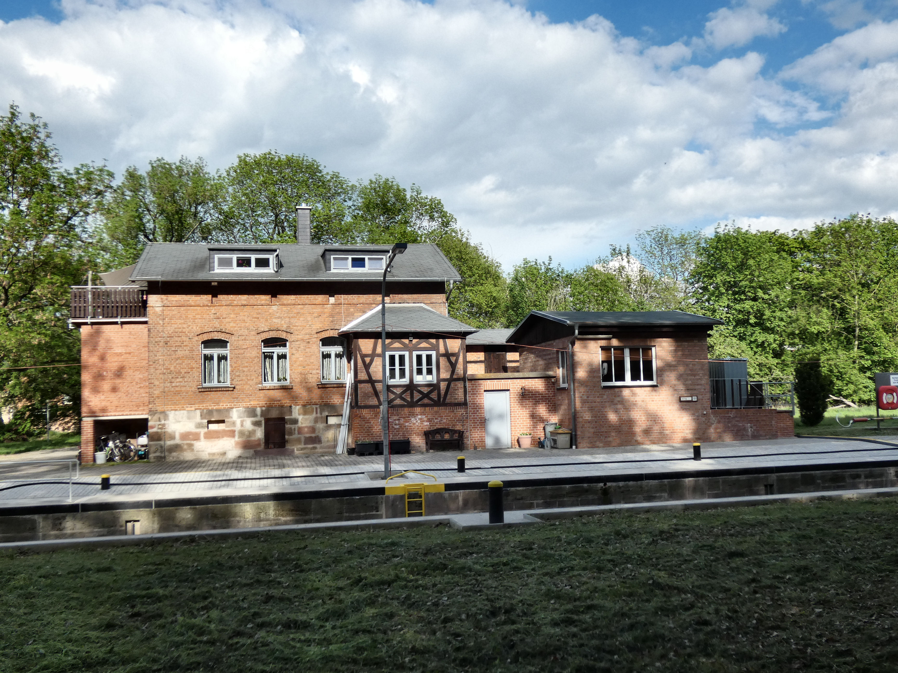 Schleuse Halle-Trotha, Halle (Saale)